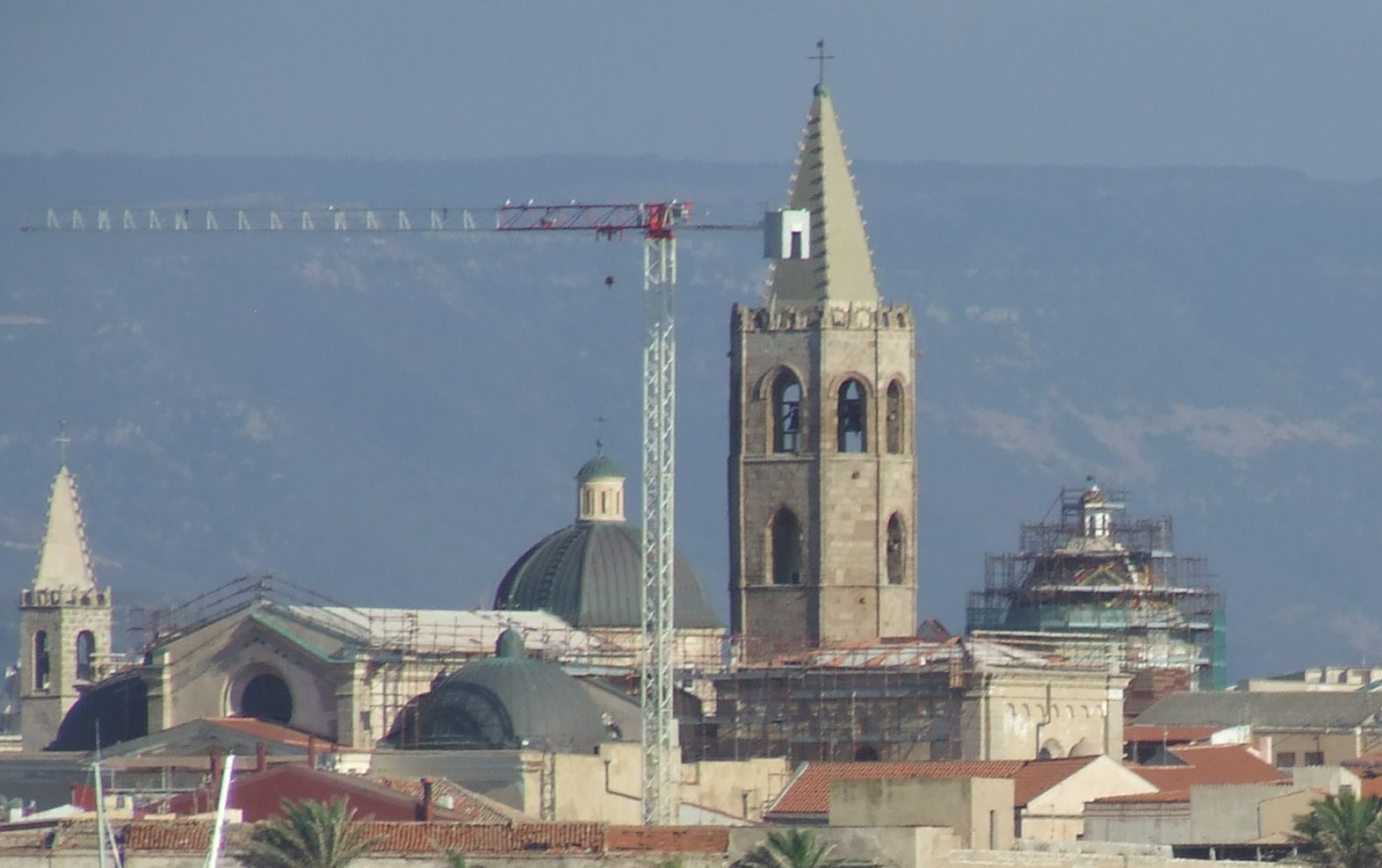 Una vista di Alghero rientrando in porto